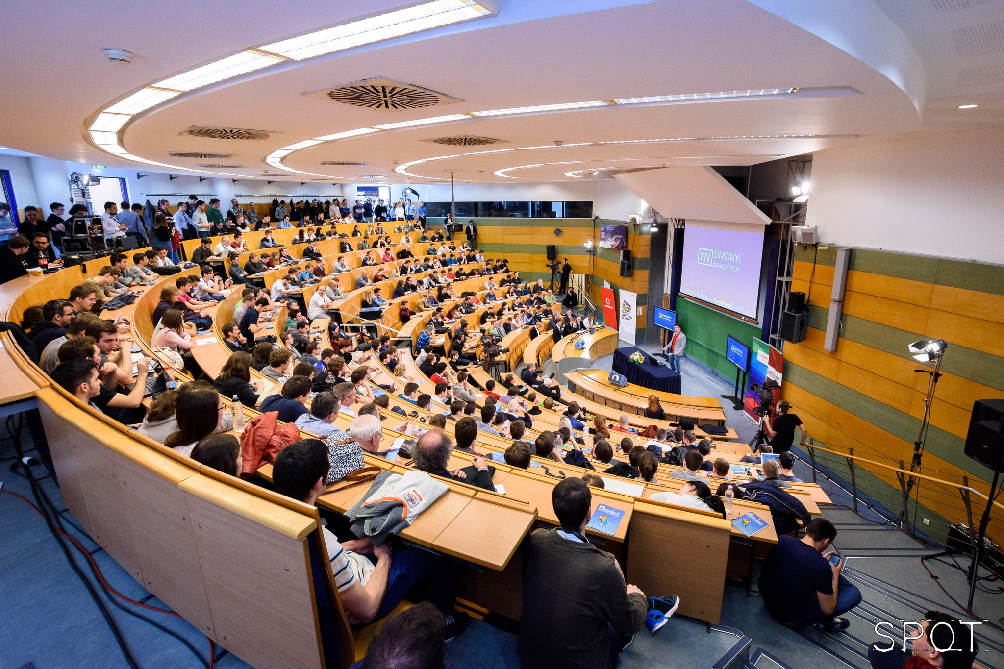 Simonyi Konferencia 2019-ben a BME I épületének előadójában